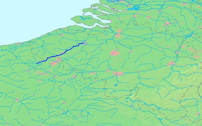 Leie river (Lys), Belgium